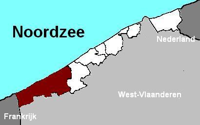 zelf gemaakt kaartje van de westkust (van de panne tem westende)